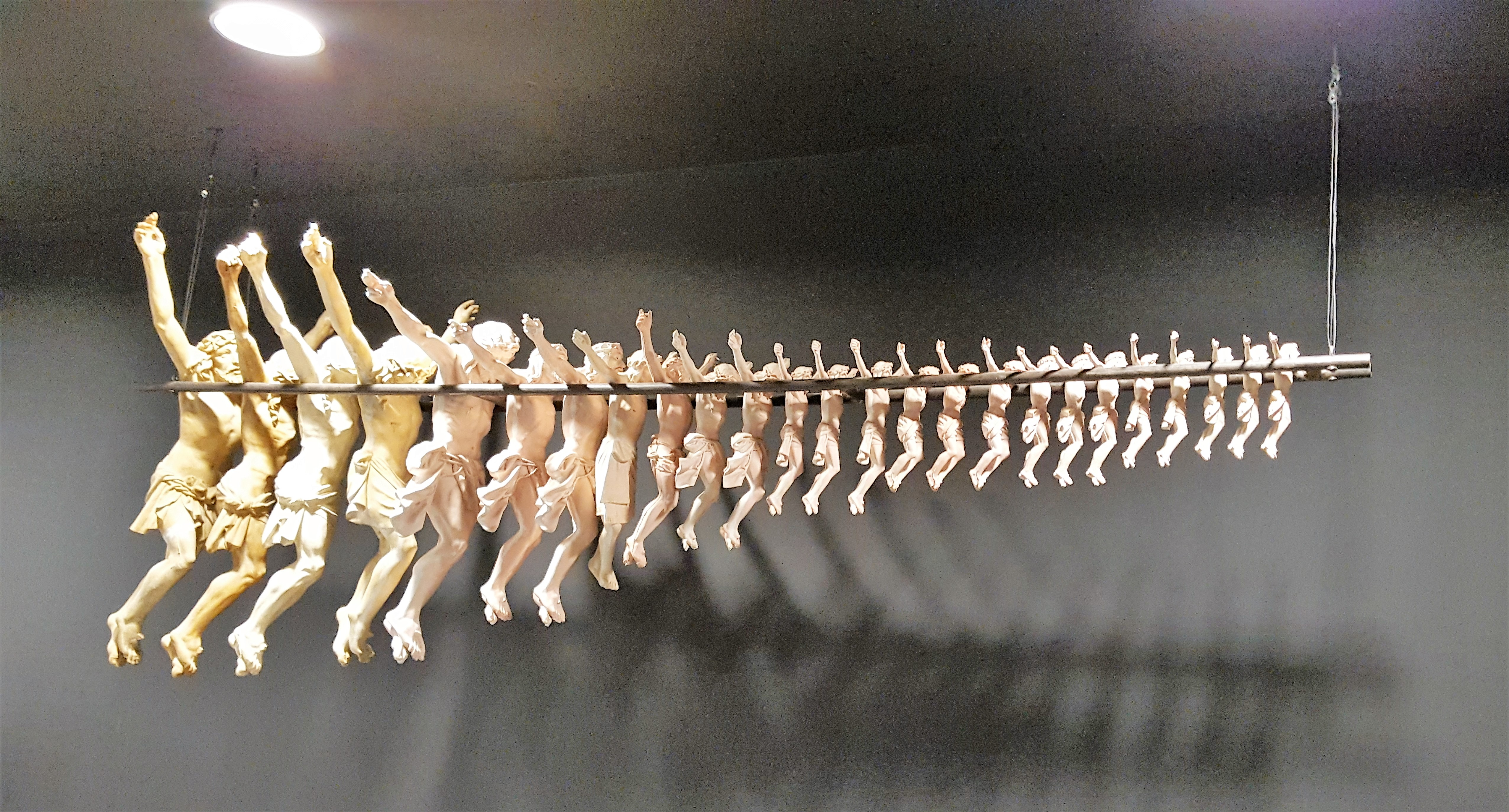 Christus von der Stange: Christus-Korpora abgestufter Größen im Museu dels Sants d’Olot (Katalonien)